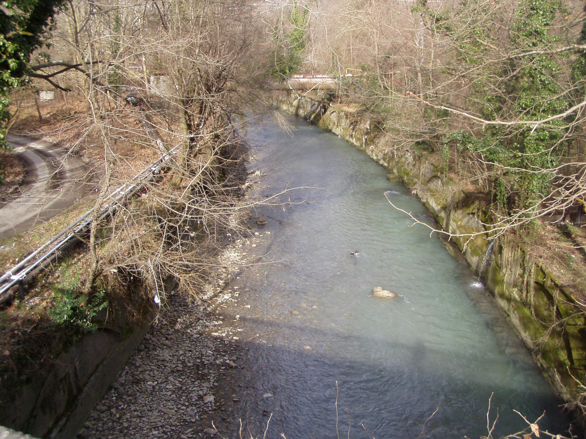 Река Мацеста в городской черте Сочи